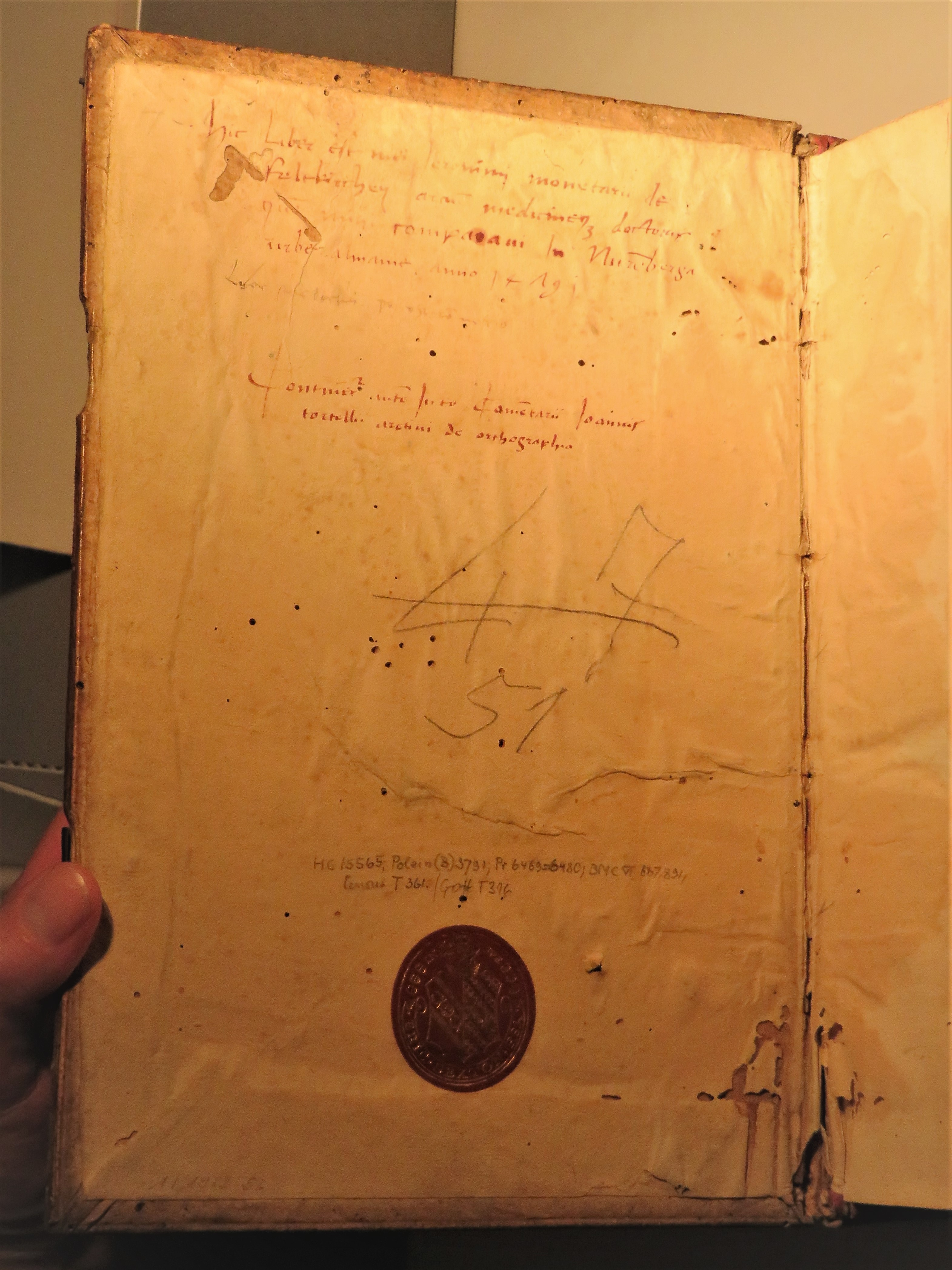 Vorderer Spiegel der Inkunabel "De orthographia", im Jahr 1477 in Treviso gedruckt von Hermann Liechtenstein, Exemplar der Liechtensteinischen Landesbibliothek in Vaduz